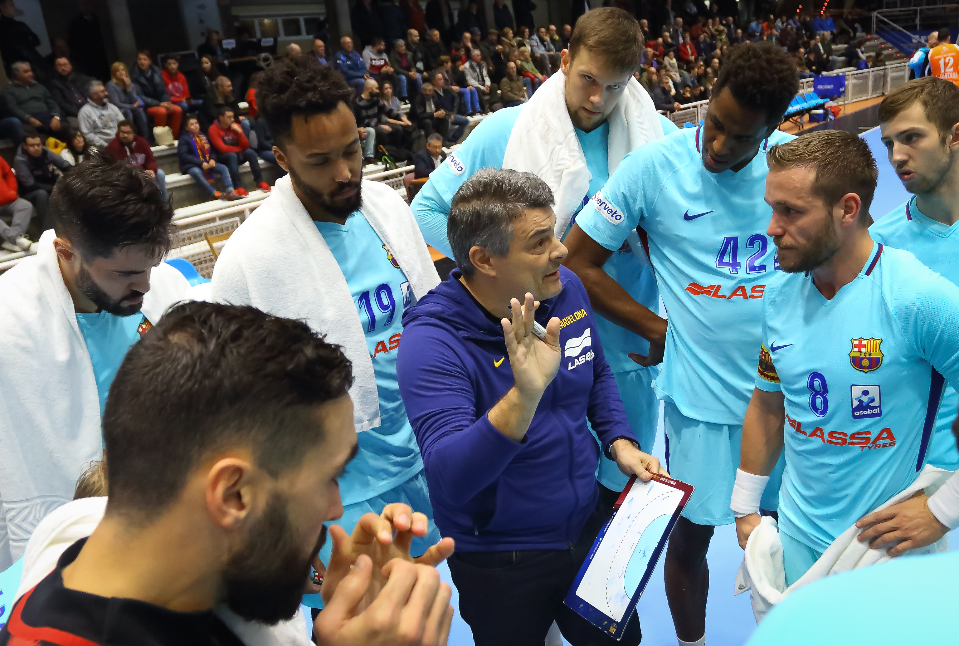 Condes de Albarei Teucro – FC Barcelona Lassa: (28-38) Los de Xavi Pascual derrotan al equipo gallego y cierran la primera vuelta de la Asobal con un nuevo triunfo en la competición doméstica, en un partido en el que Valero Rivera ha sido el máximo anotador